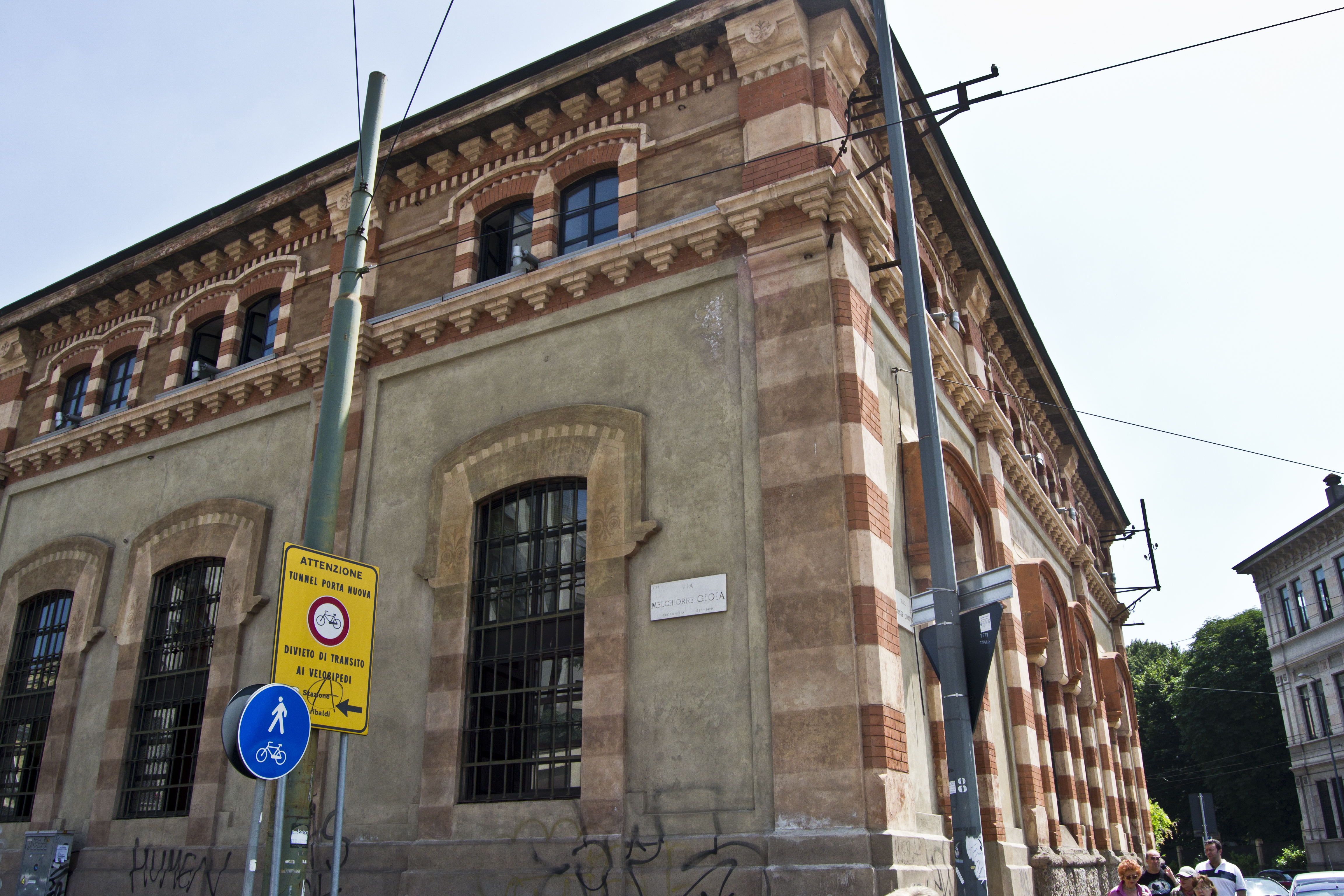 Mensa dell'Opera pia Cucine economiche, in viale Monte Grappa 8 (angolo via Melchiorre Gioia) a Milano. L'edificio fu costruito dal 1881 al 1883 su progetto di Luigi Broggi.